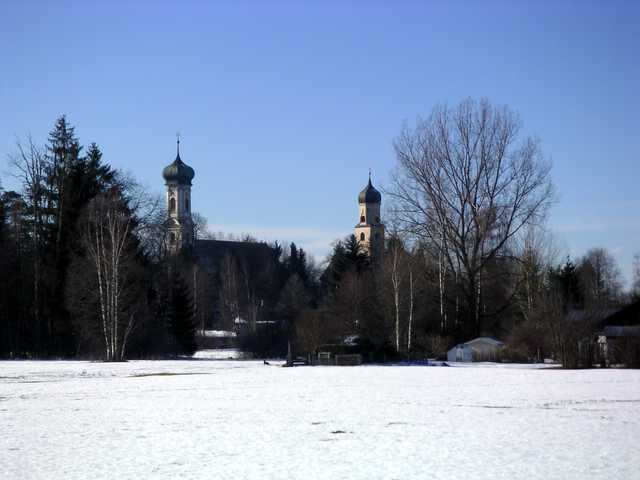 Blick auf die Türme von St. Nikolai und St. Georg. Andere Versionen